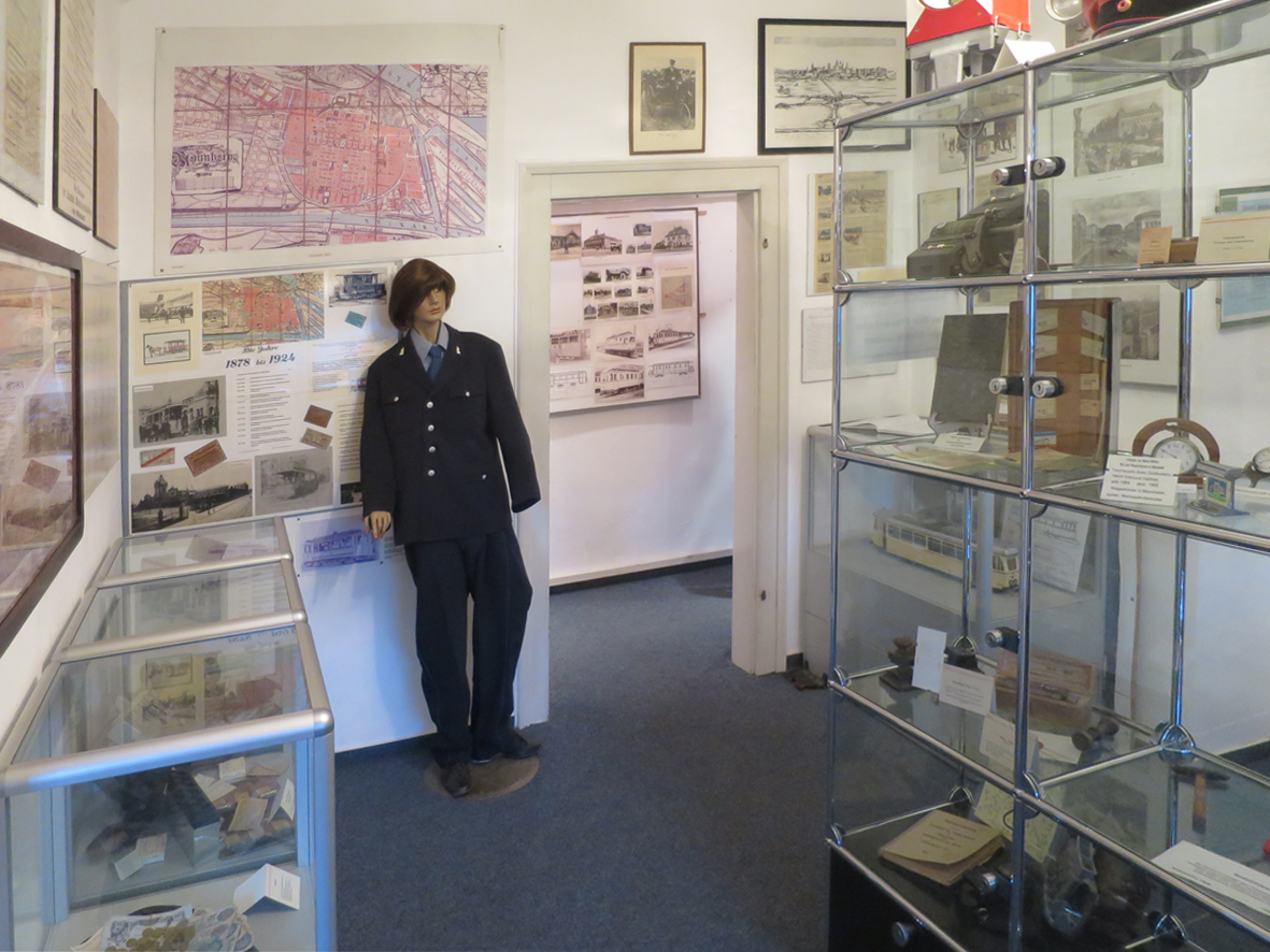 Nahverkehrsmuseum "Depot 5" in Mannheim